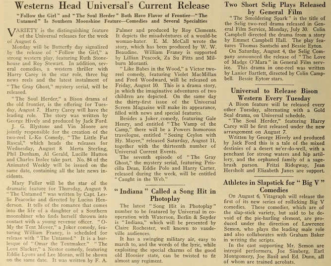 Noticia sobre el estreno de la película de Jack Ford The Soul Herder.